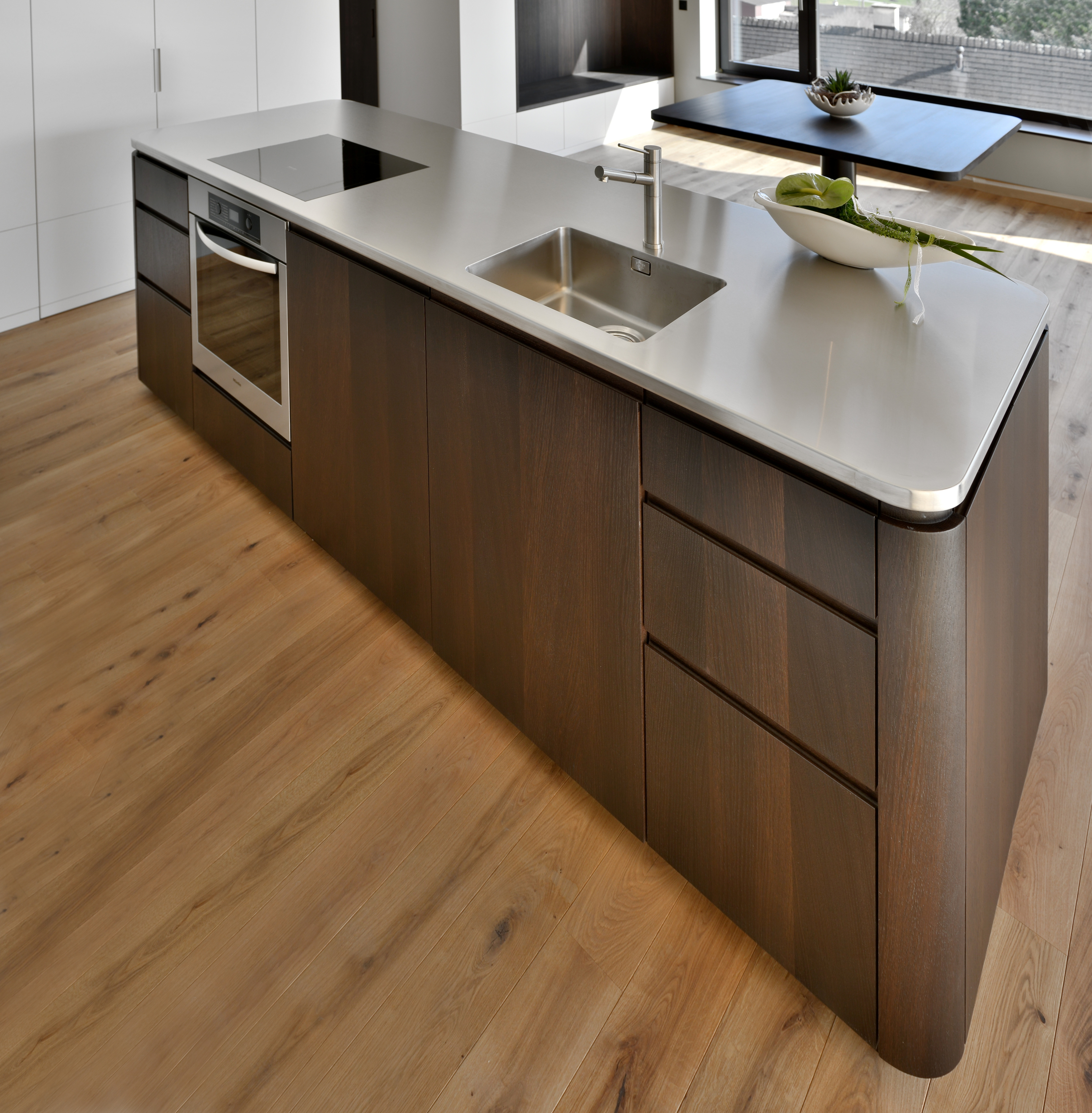 Küche Mittelblock aus Räuchereiche, 2014 gefertigt von einem Tischler. Arbeitsplatte aus CrNi-Blech mit eingeschweisstem Becken.